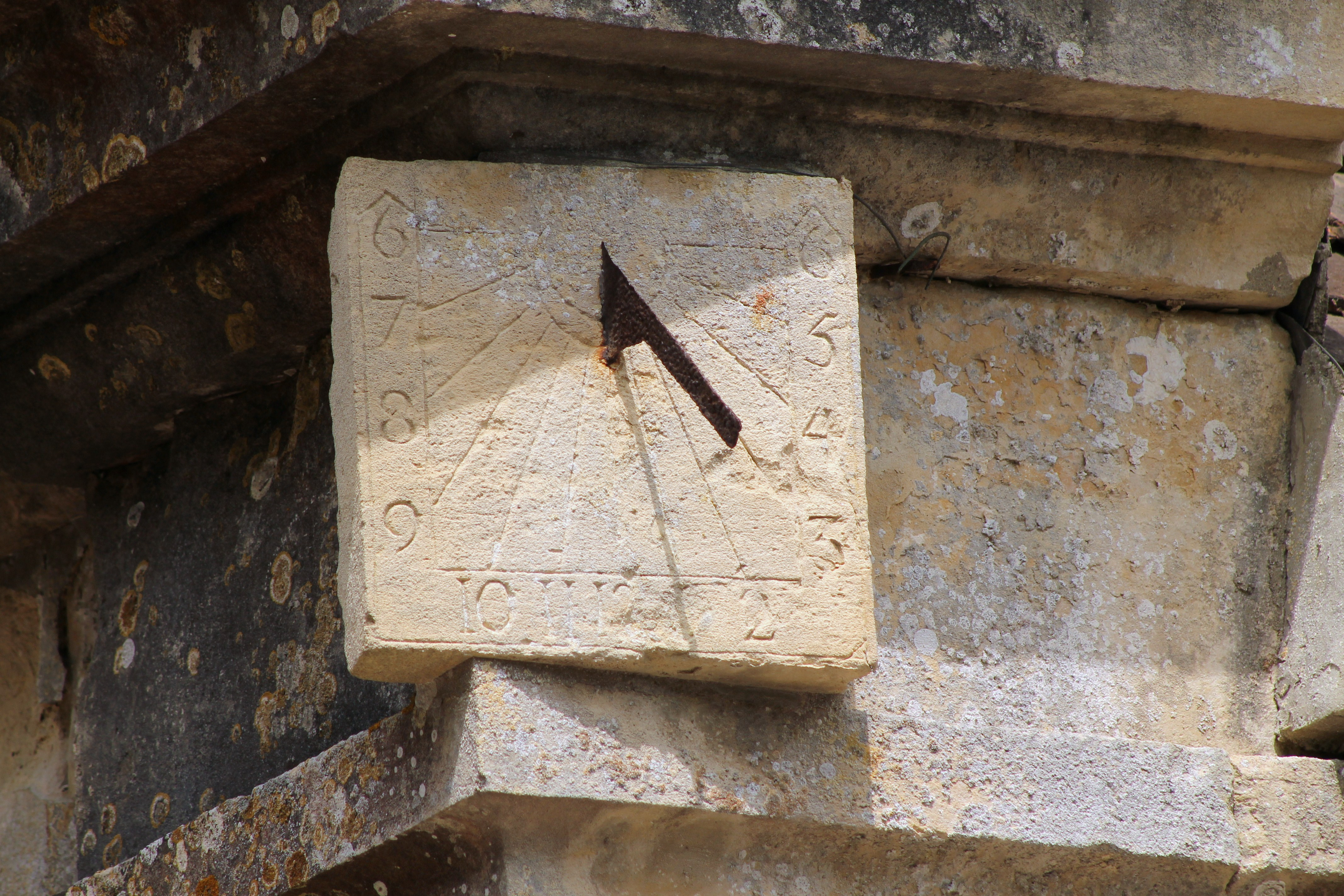 Cadran solaire sur l'église Sainte-Croix de Bissières (Calvados)